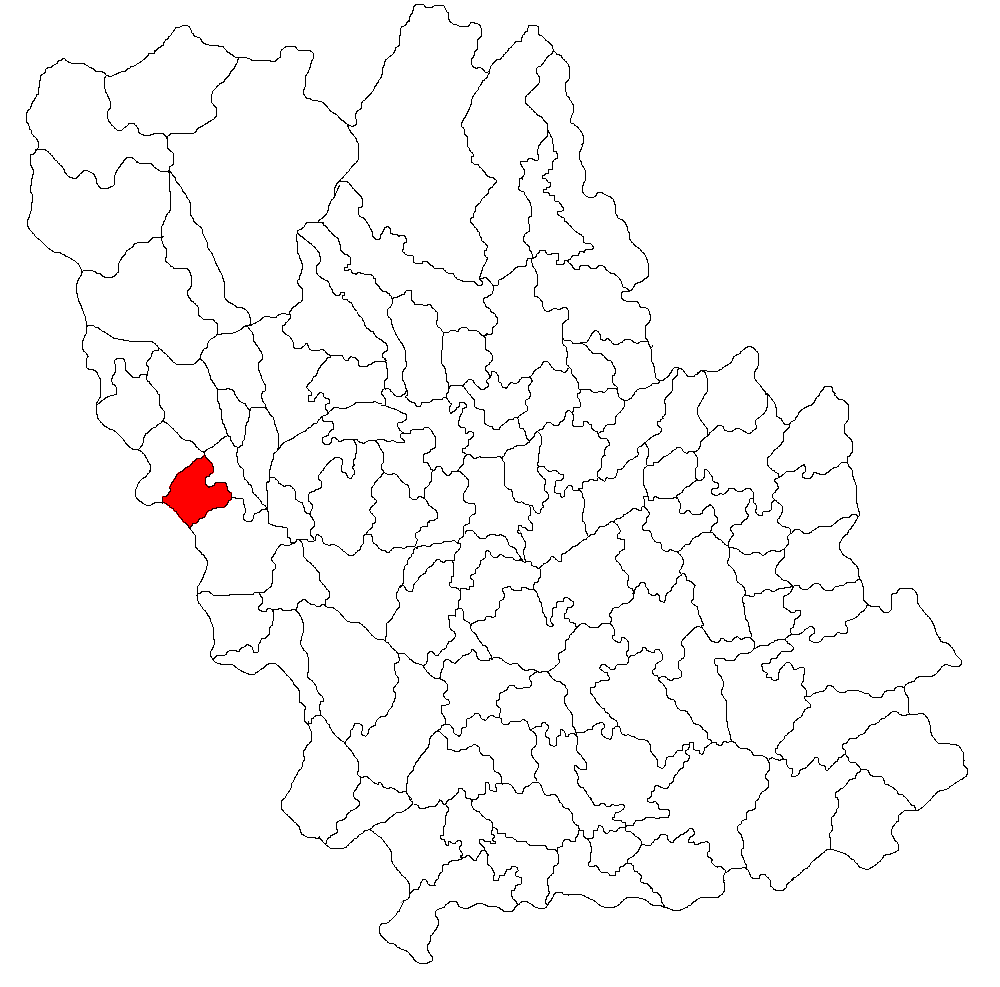 Categorie:Hărţi ale judeţului Prahova